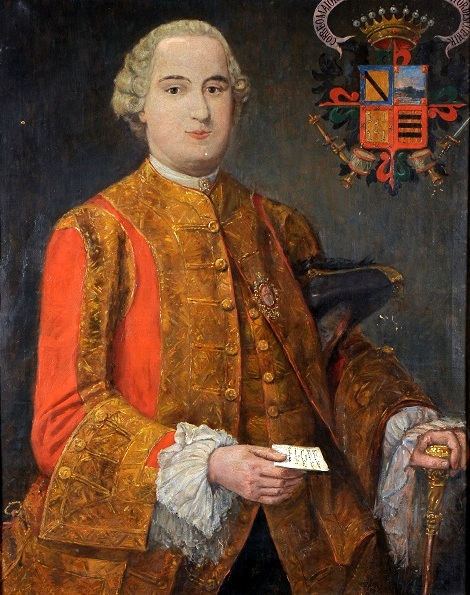 Fermin-francisco-carbajal-y-vargas